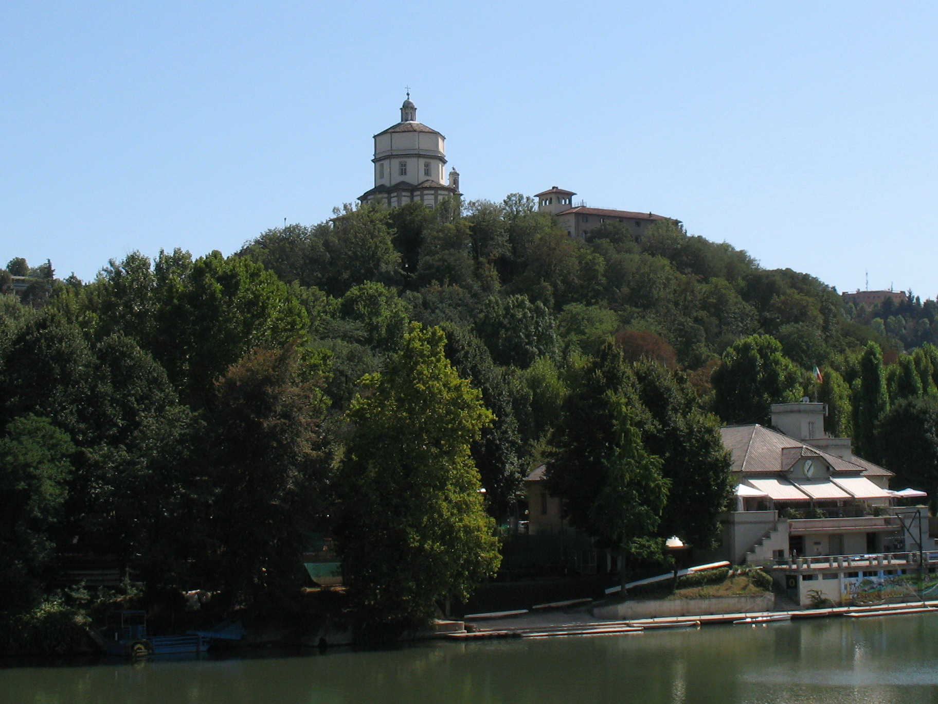 Monte dei Cappuccini visto dai Murazzi, particolare